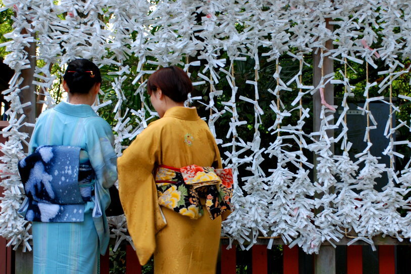 People and LifeOmikujibad luck